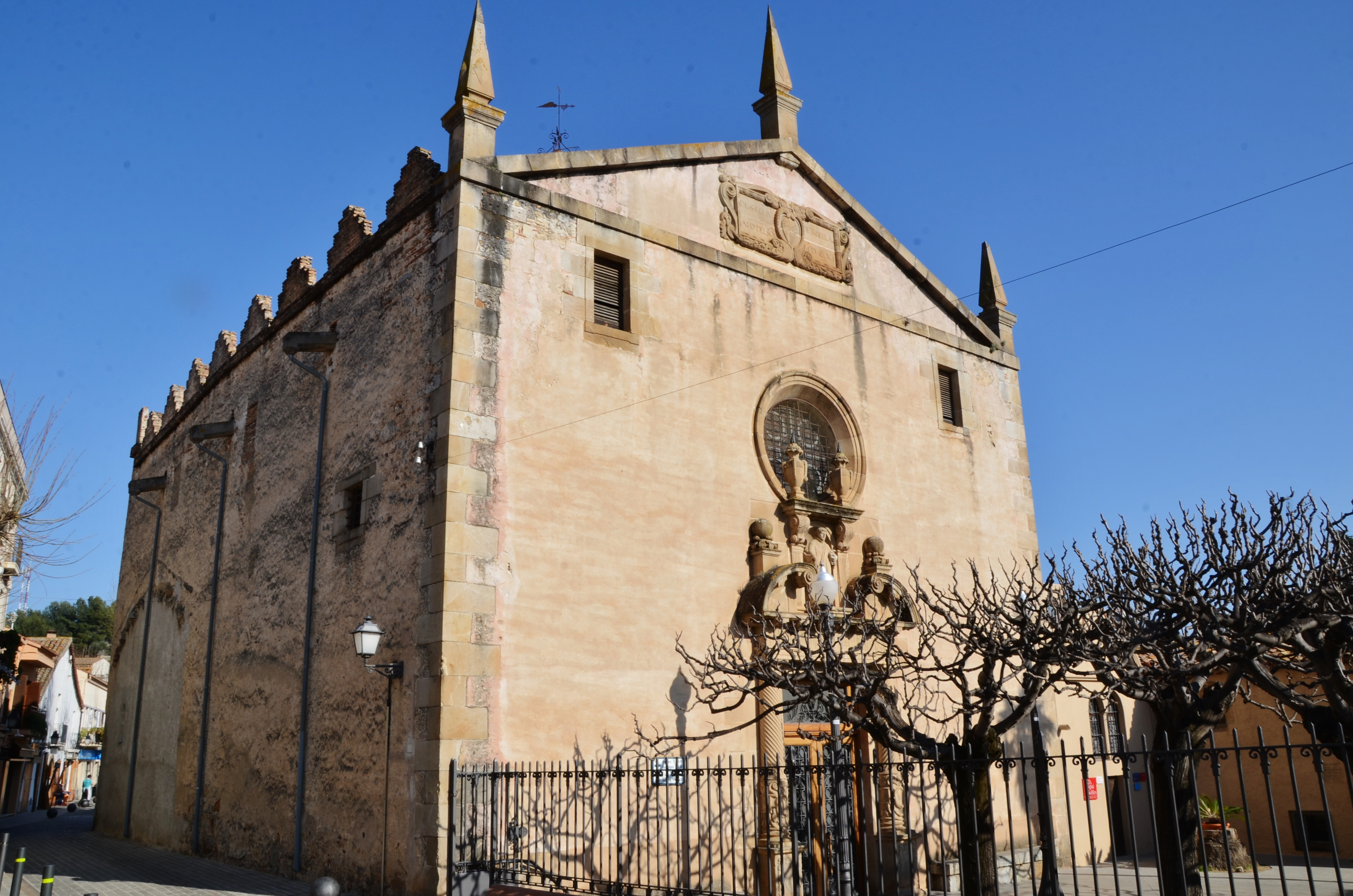 Església de Sant Feliu d'Alella